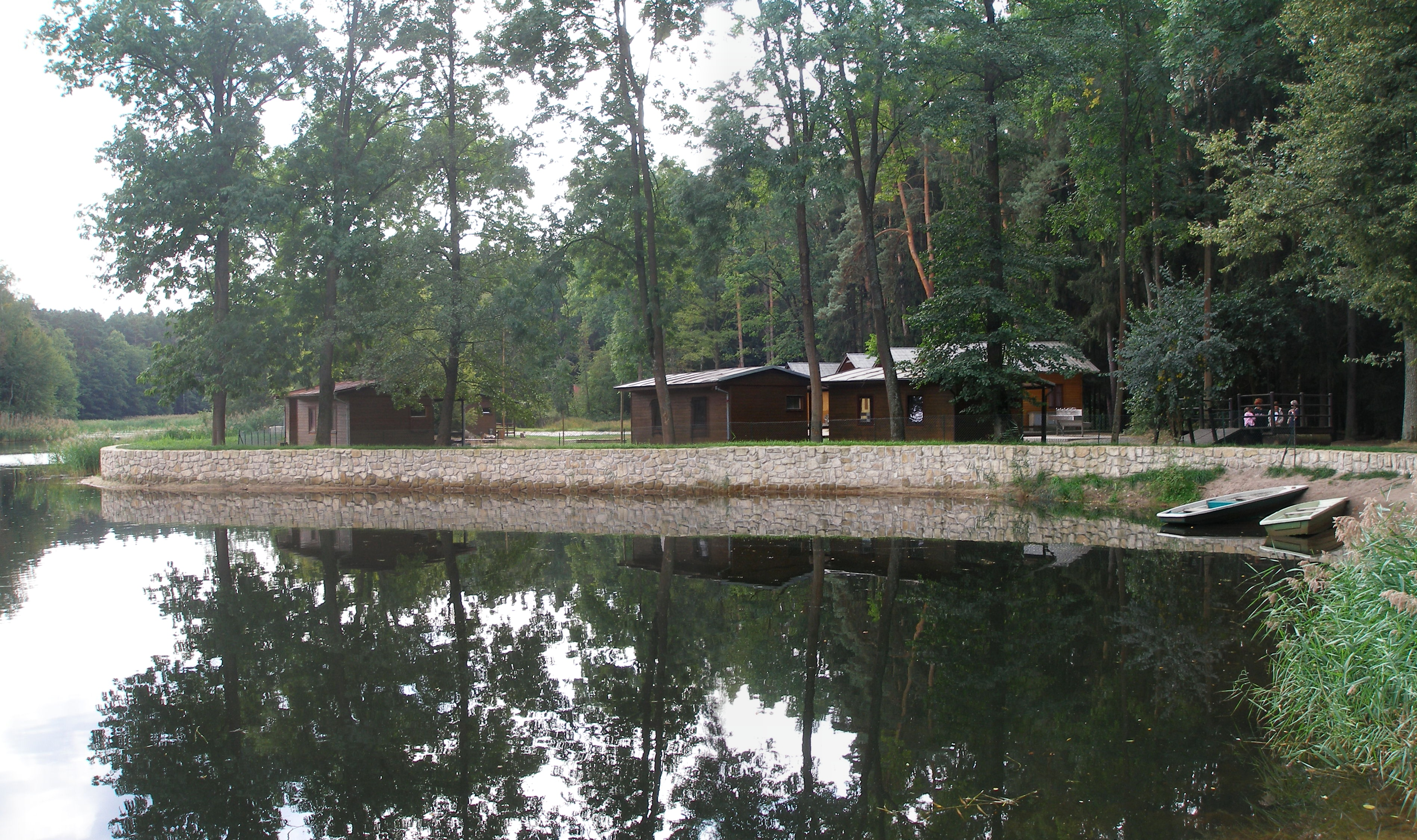 Malý tábor na břehu Mlýnského rybníka v Táboře J. A. Komenského.